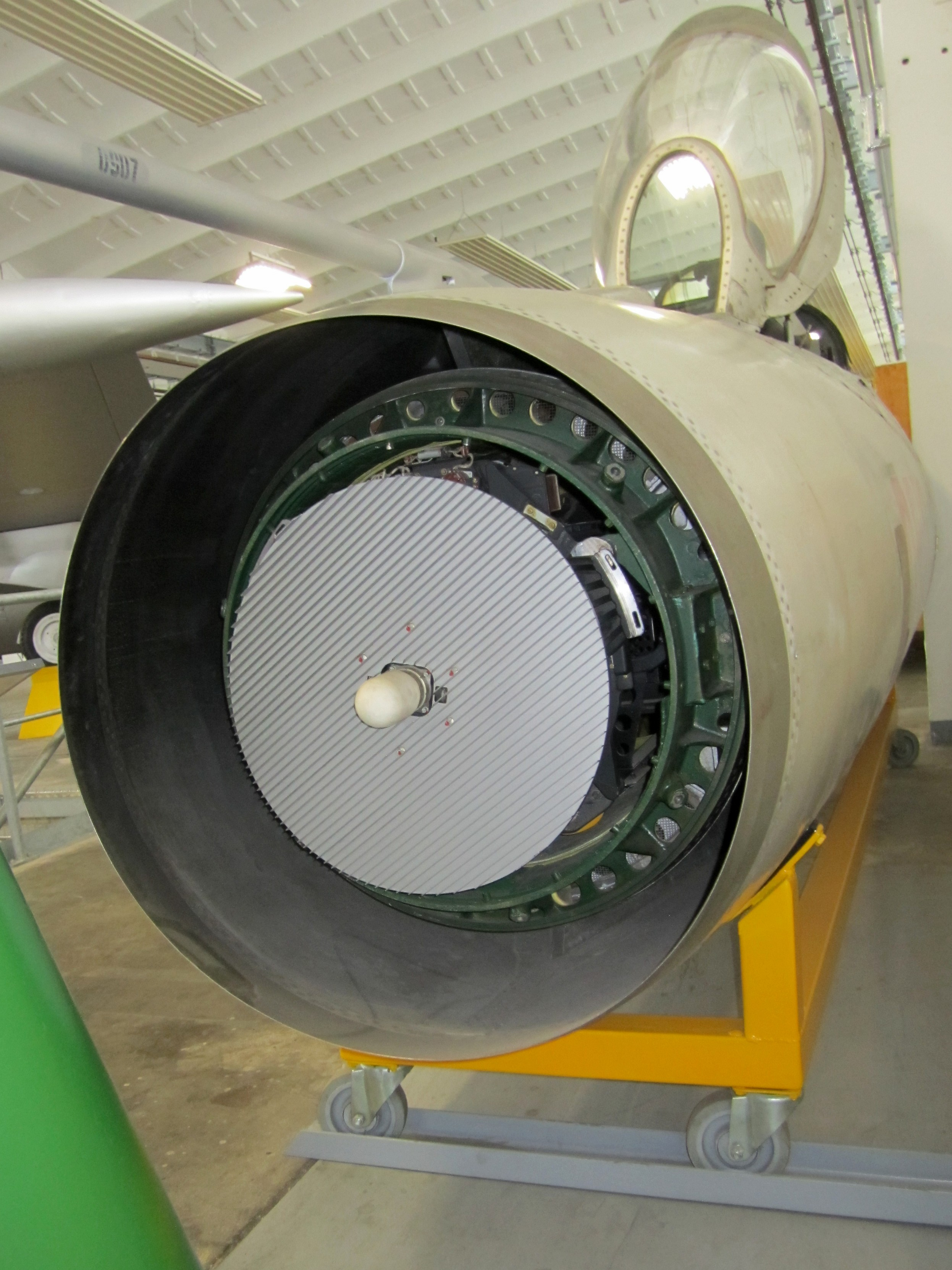 Radarantenne der Mikojan MiG-21PFM im Luftfahrtmuseum Wernigerode, Sachsen-Anhalt, Deutschland.